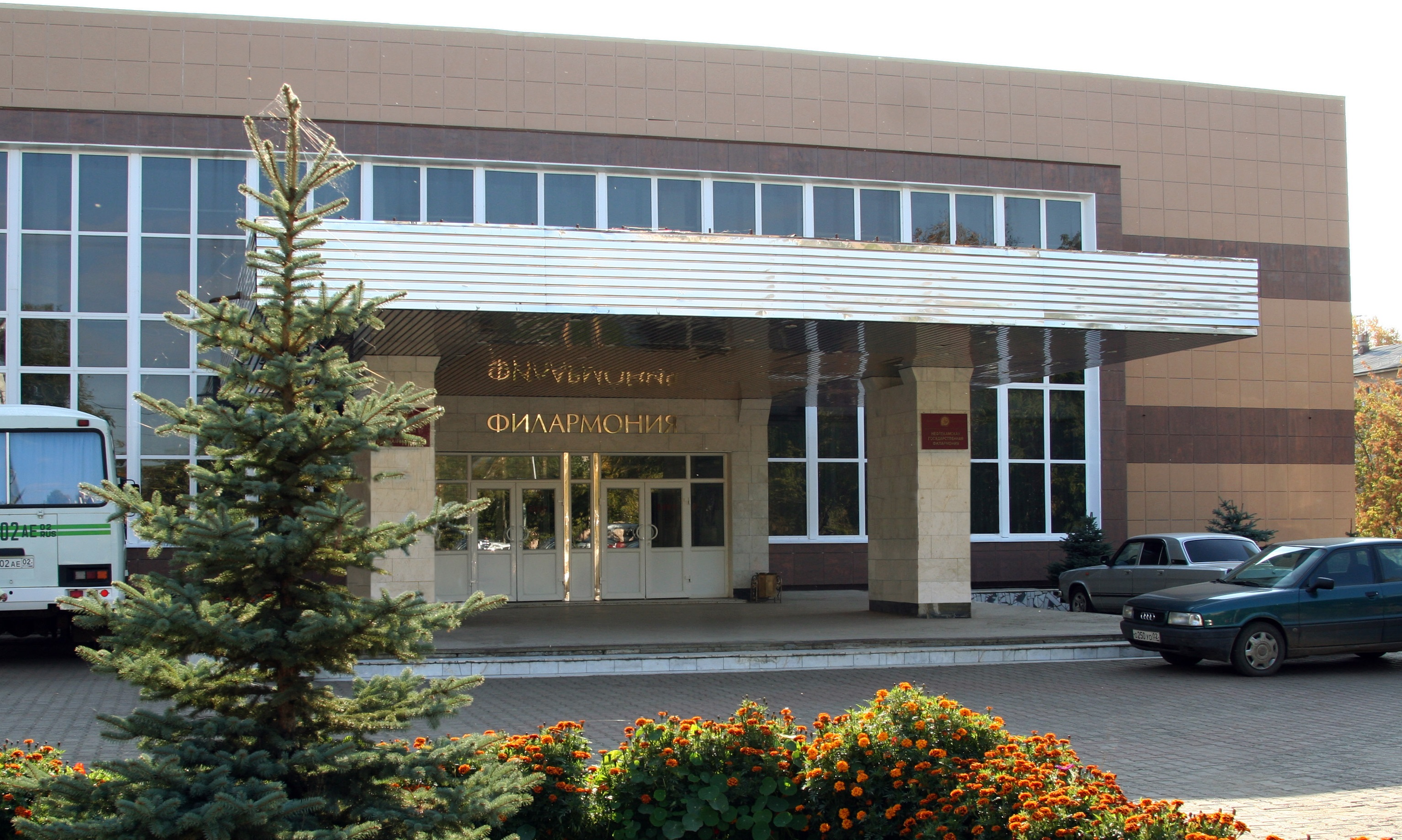 Нефтекама филармонияһы